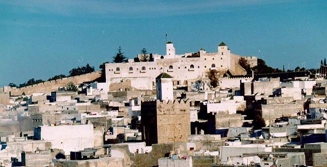 minaret almohad à safi